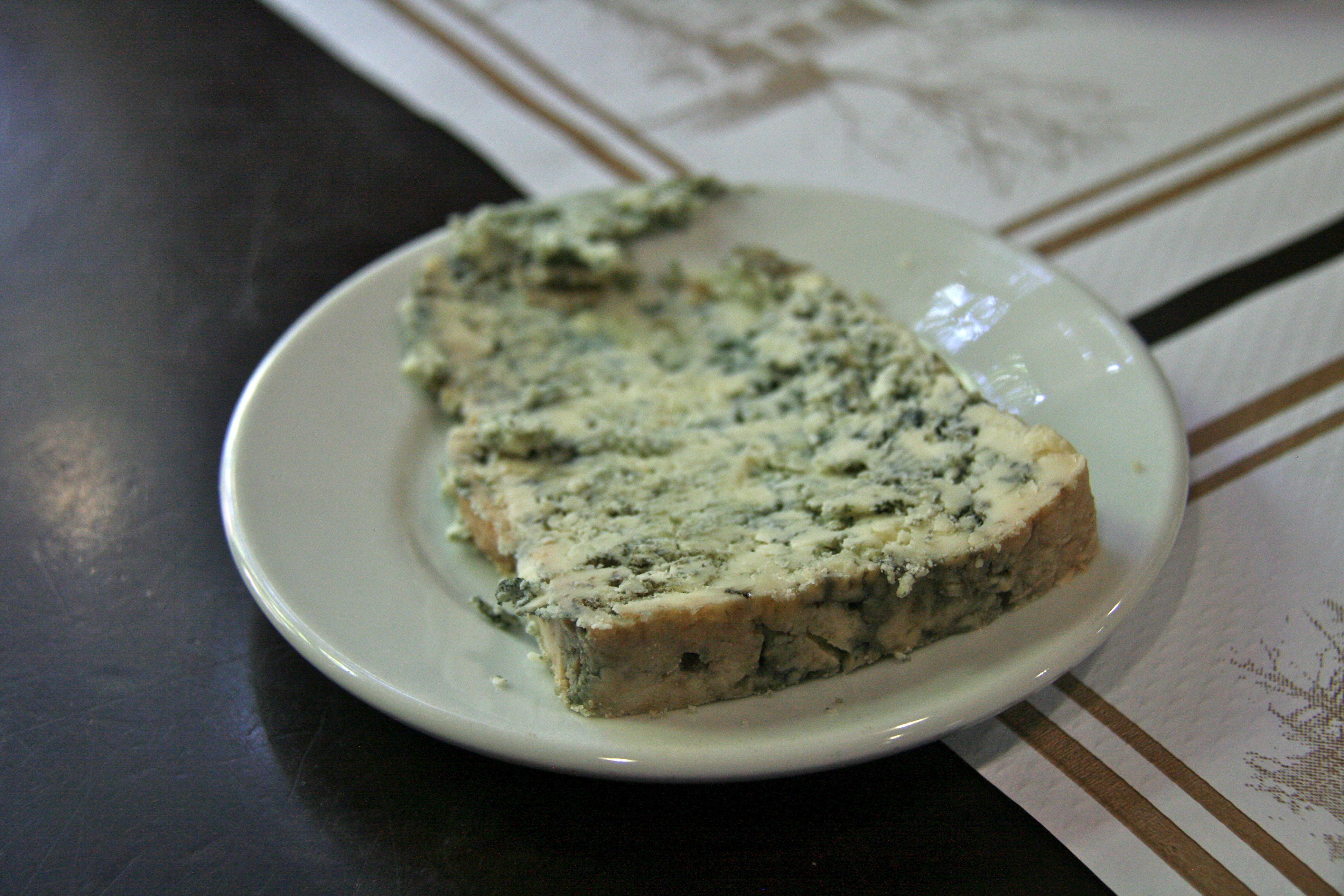 Queso de Cabrales, halbfester Schnittkäse mit Blauschimmel